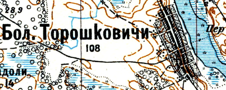 Топографическая карта Ленинградской области, квадрат Vc-29 (Батецкая), деревня Торошковичи